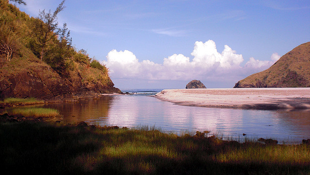 Anawangin Cove, San Antonio, Zambales, Philippines